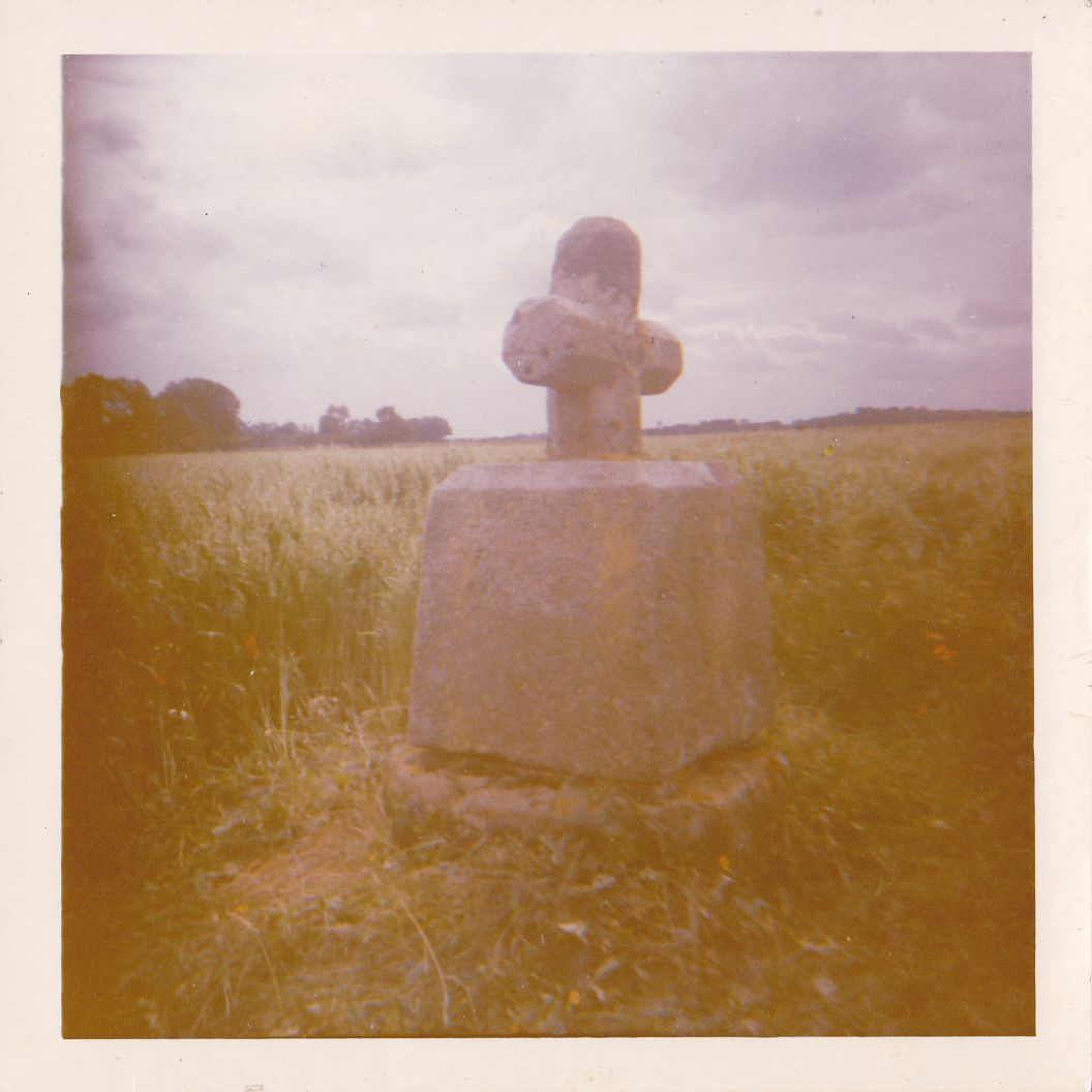 La croix de la plaine de Bennetot telle qu'elle se trouvait à son origine sur la commune de Beaunay - Photo réalisée en juin 1971, avant son déplacement.